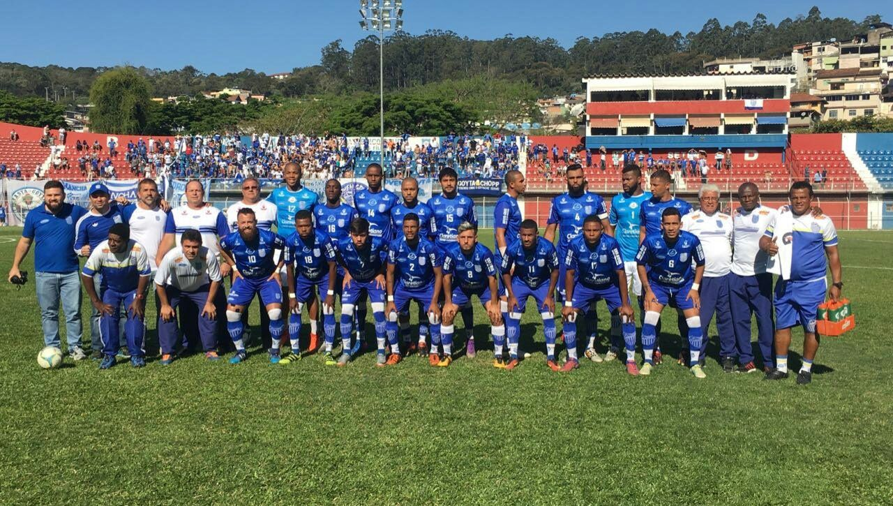 Foto do jogo Americano 0 x 1 Goytacaz, que valeu o acesso do alvianil a Série A do Campeonato Carioca após 25 anos.